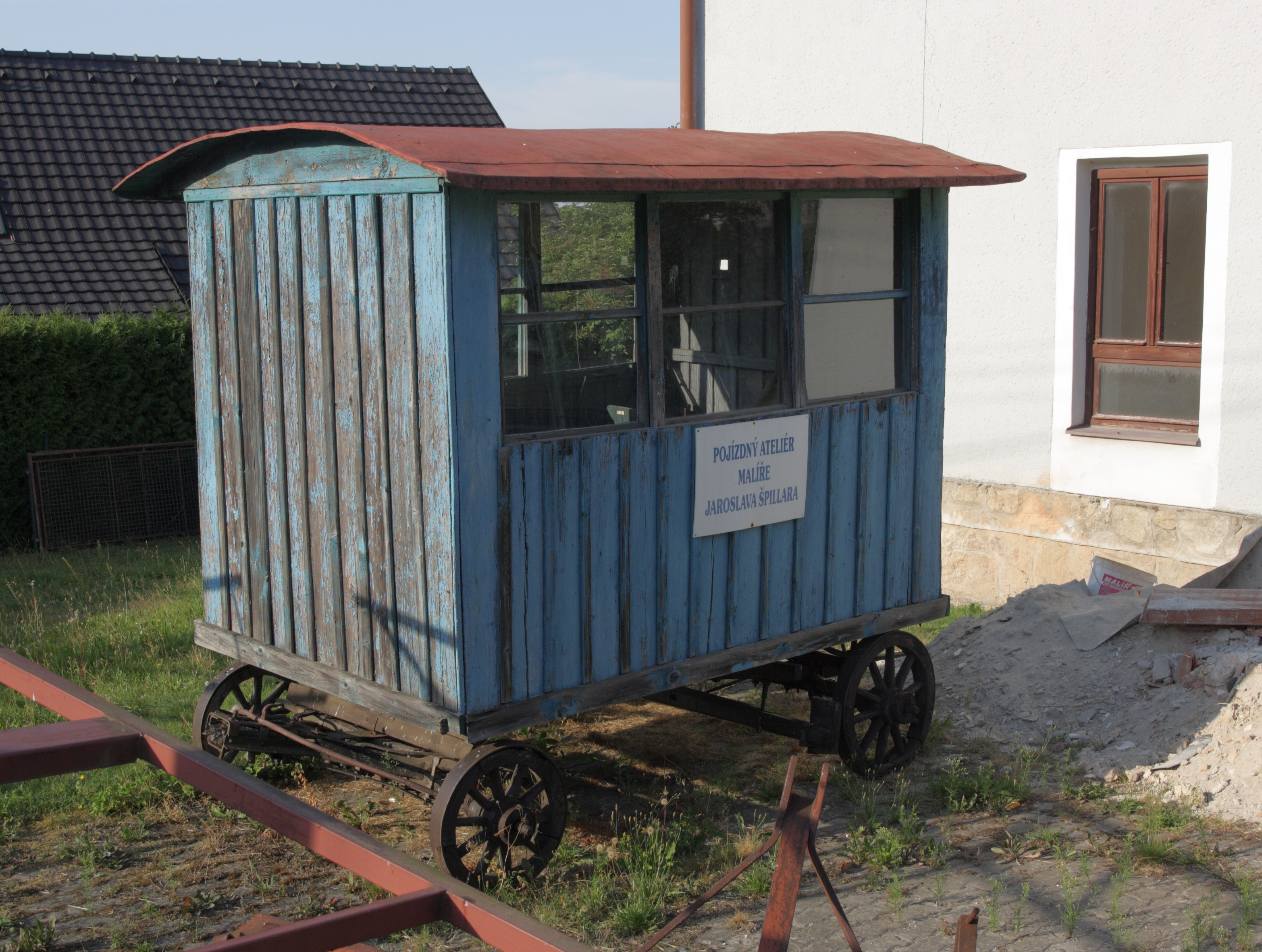 Pec (okres Domažlice) - pojízdný ateliér Jaroslava Špillara